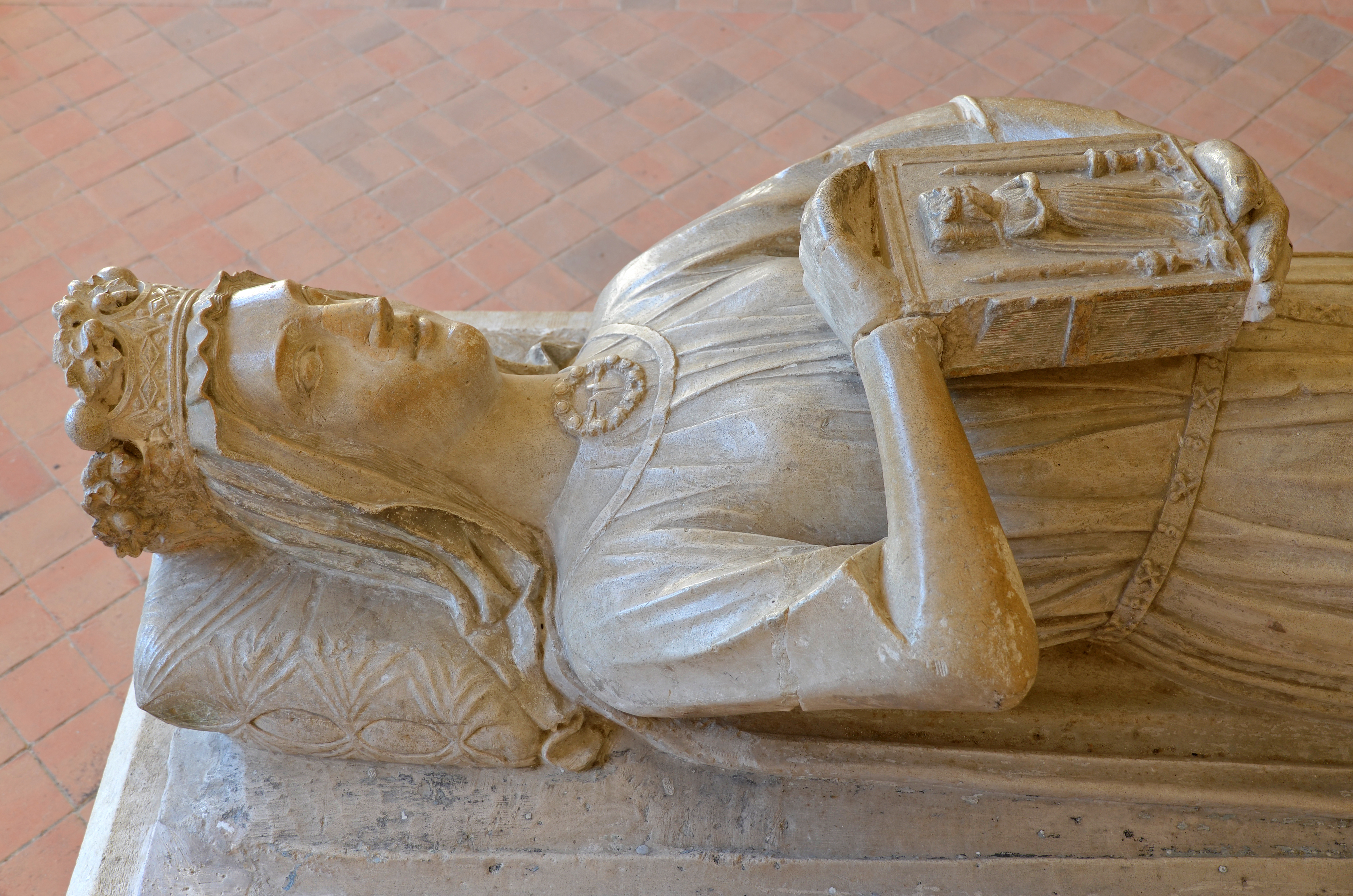 La Reine Bérengère de Navarre - Abbaye de l'Épau - Yvré-l'Évêque, Sarthe .